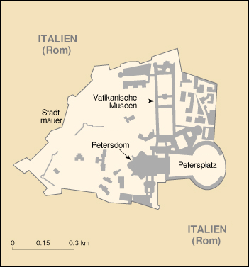 Übersetzung (256 Farben, PNG) CIA World Factbook